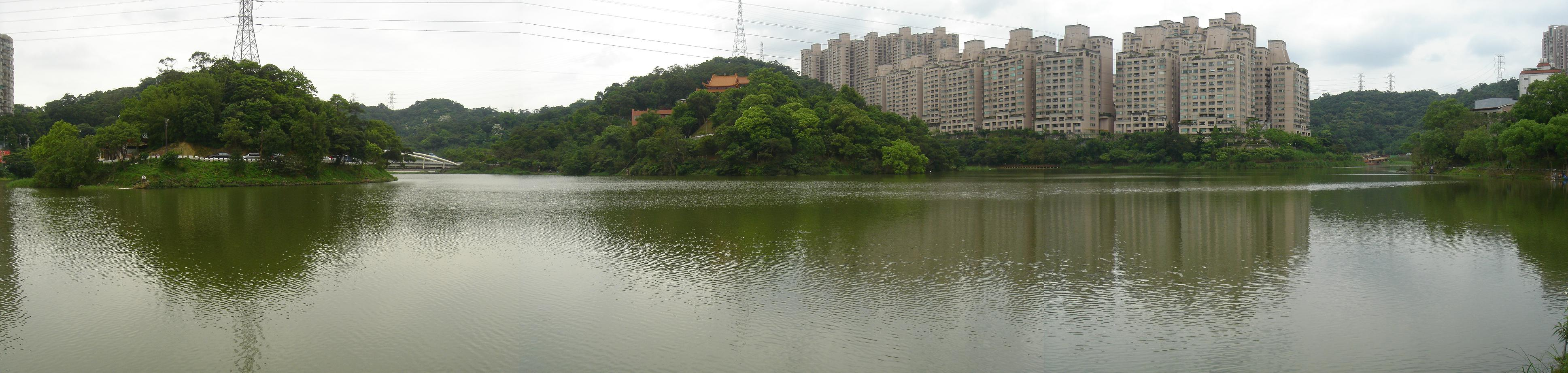 中文（台灣）: 台北縣汐止市金龍湖